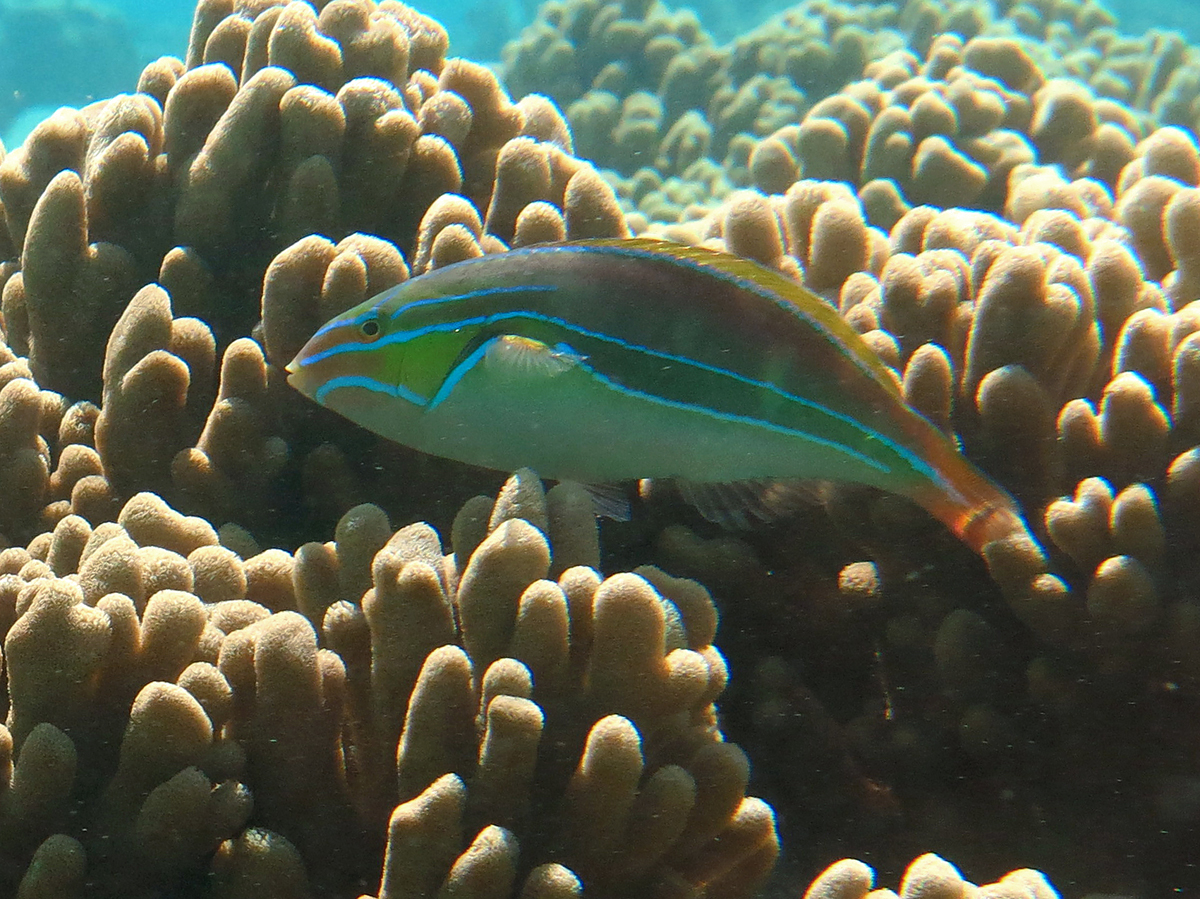 Un labre ruban à lignes bleues (Stethojulis albovittata) mâle à la Réunion.